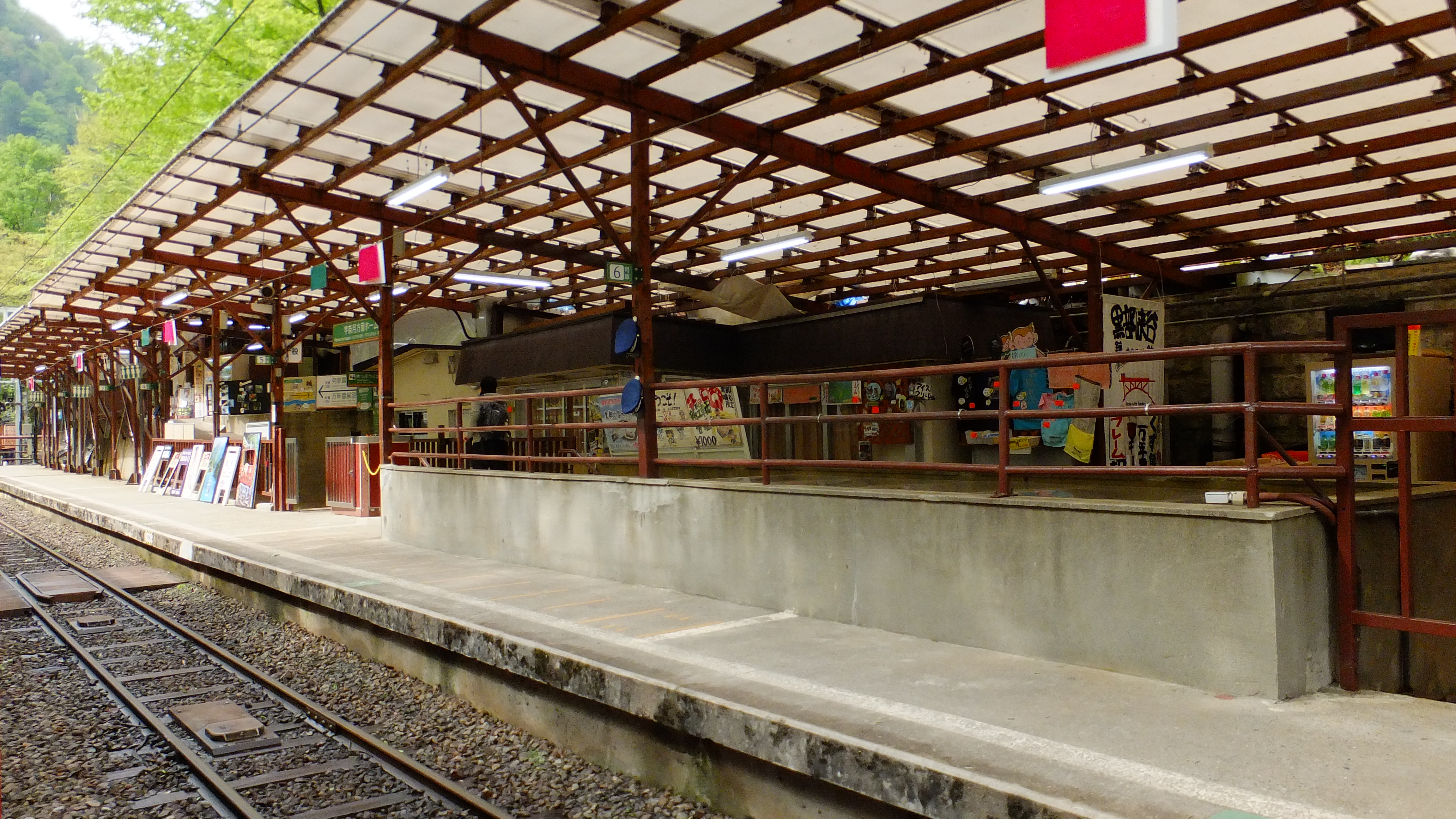 黒部峡谷鉄道 鐘釣駅